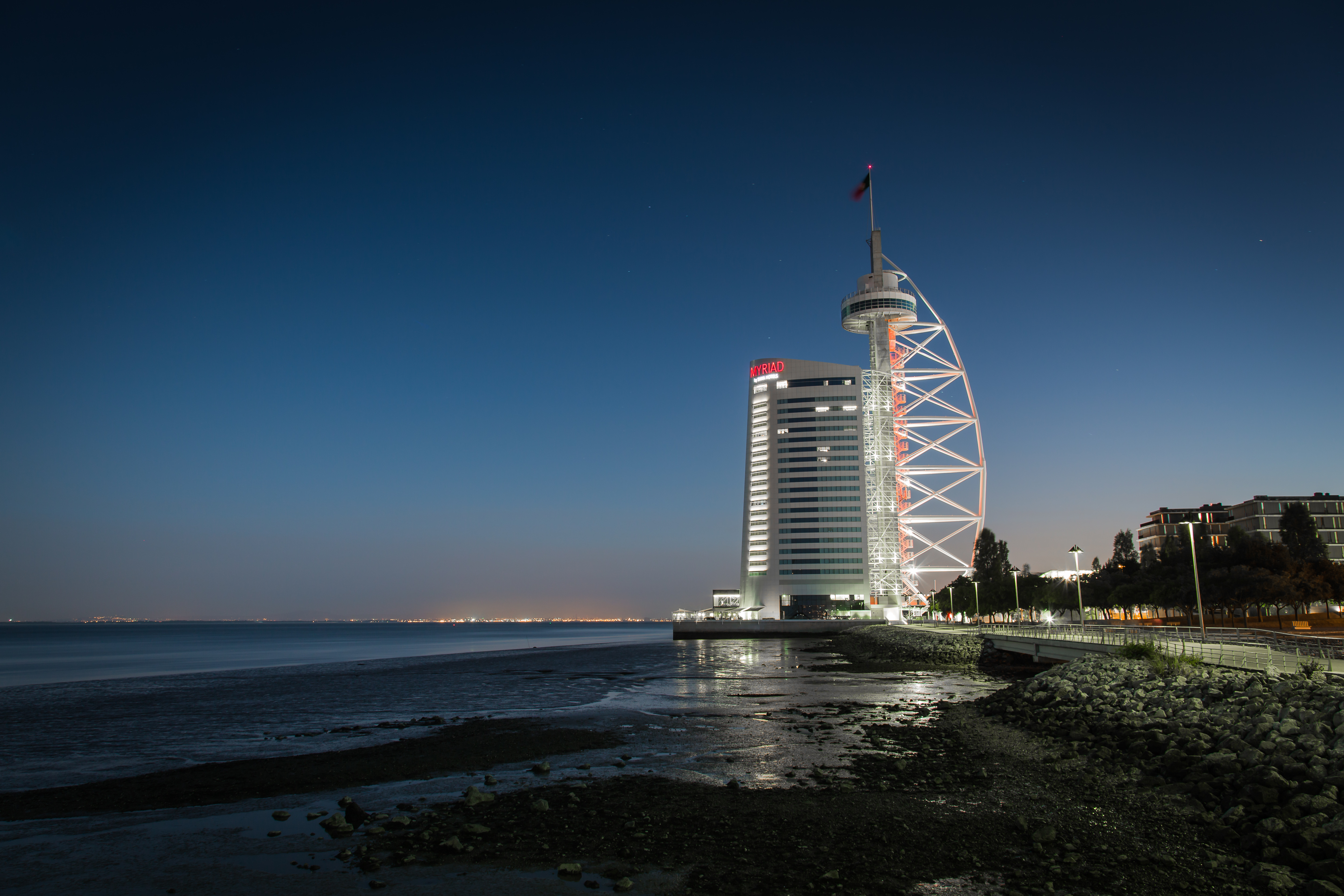 Parque das Nações, Lisboa